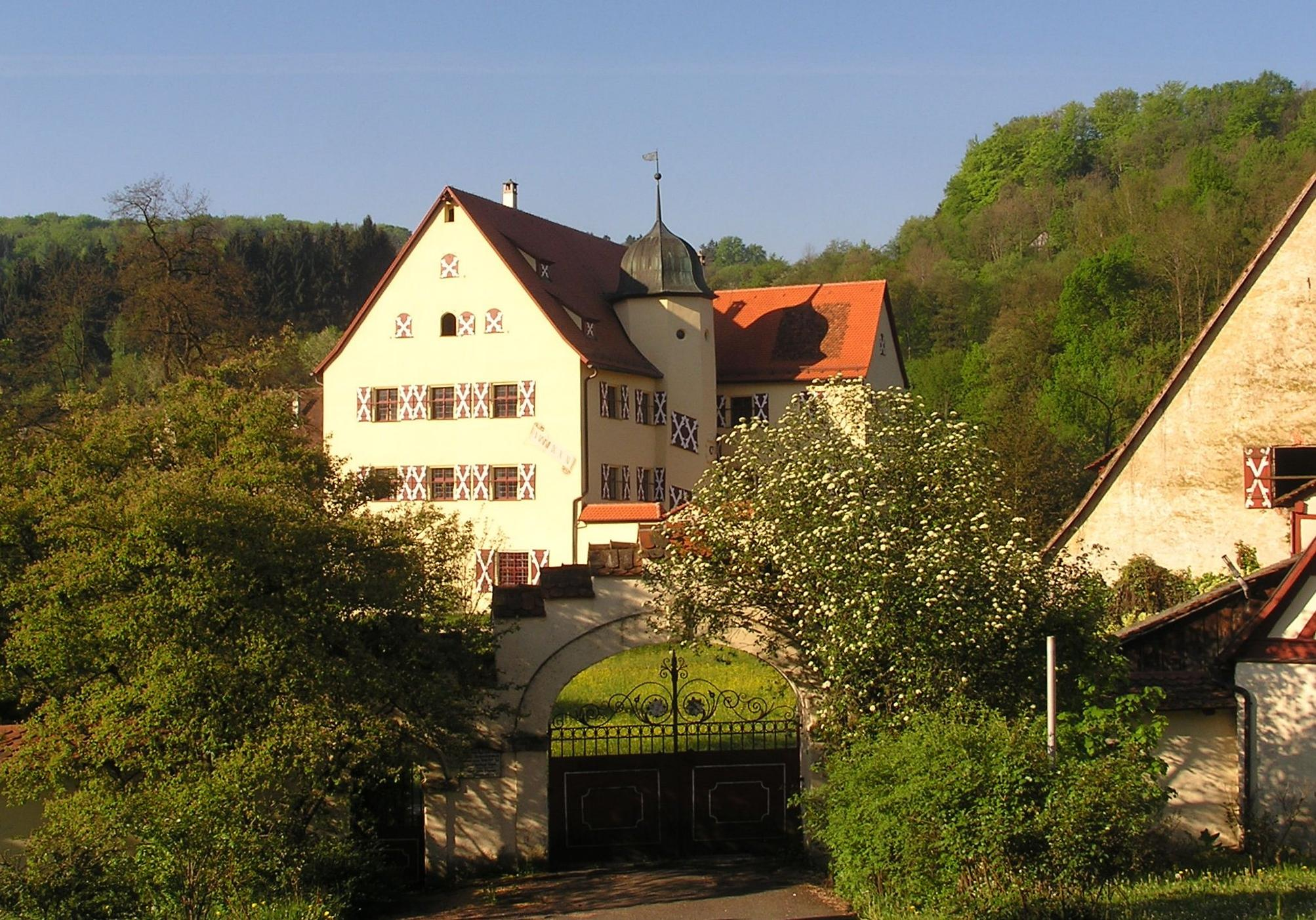 Tetzelschloss in Kirchensittenbach (Mittelfranken)